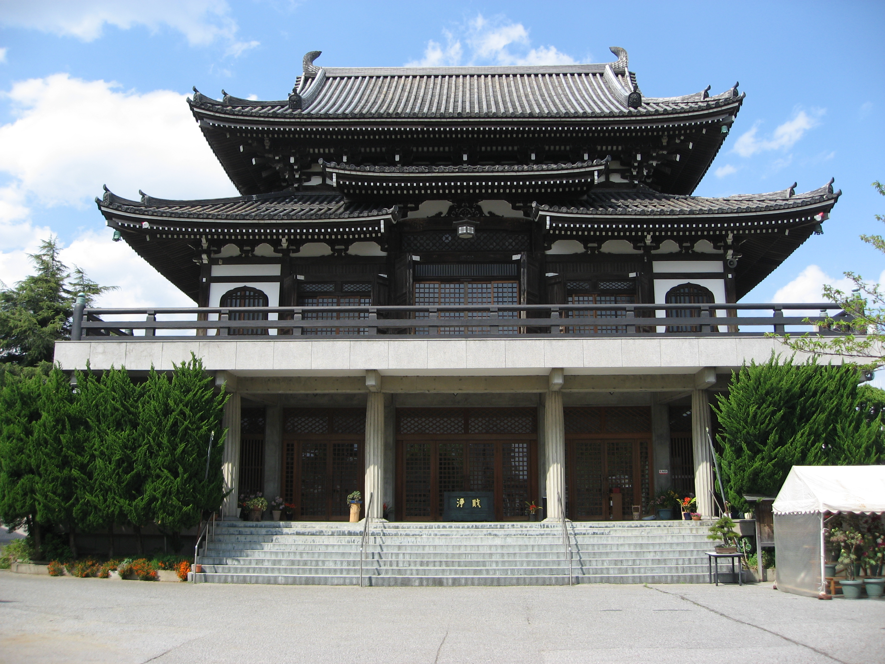 平井聖天 燈明寺